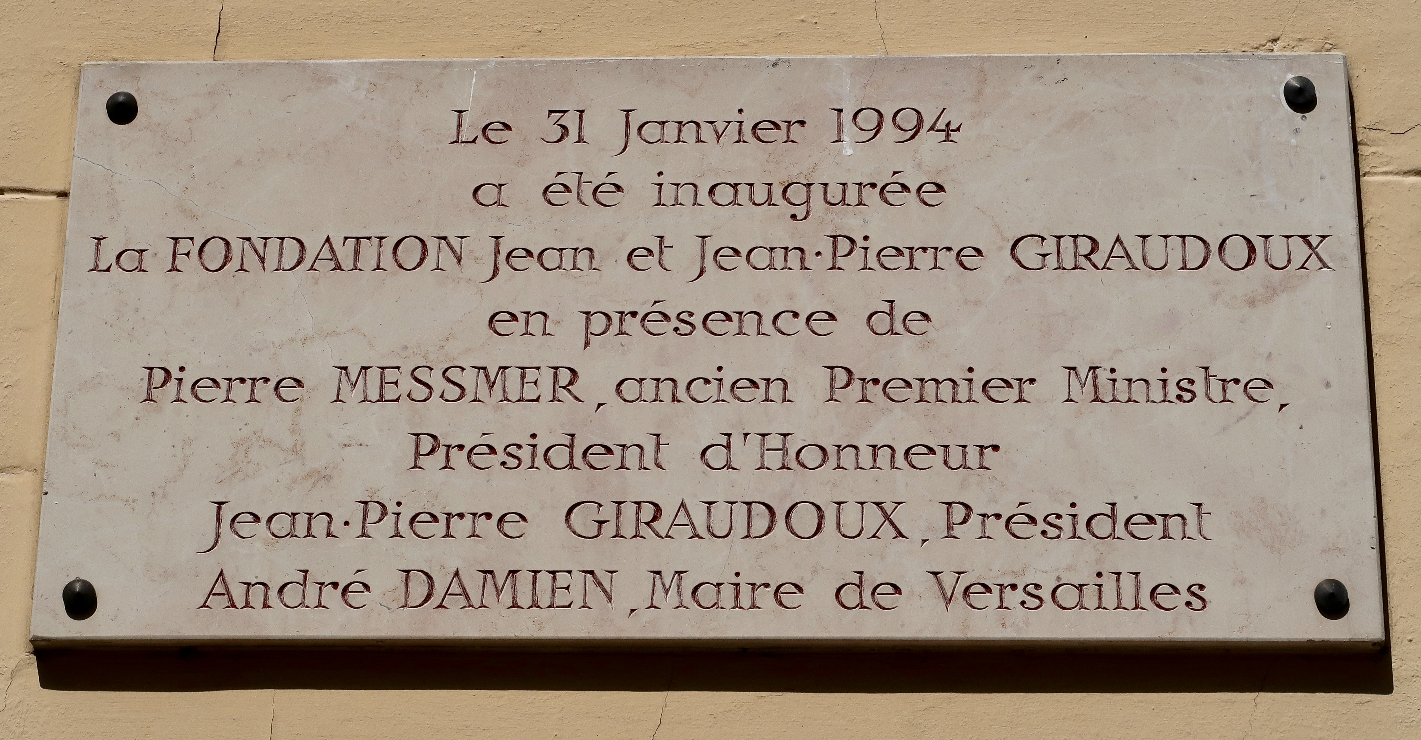 Plaque au sujet de la création de la fondation Jean et Jean-Pierre Giraudoux, 29 rue Henri-de-Régnier à Versailles (Yvelines).